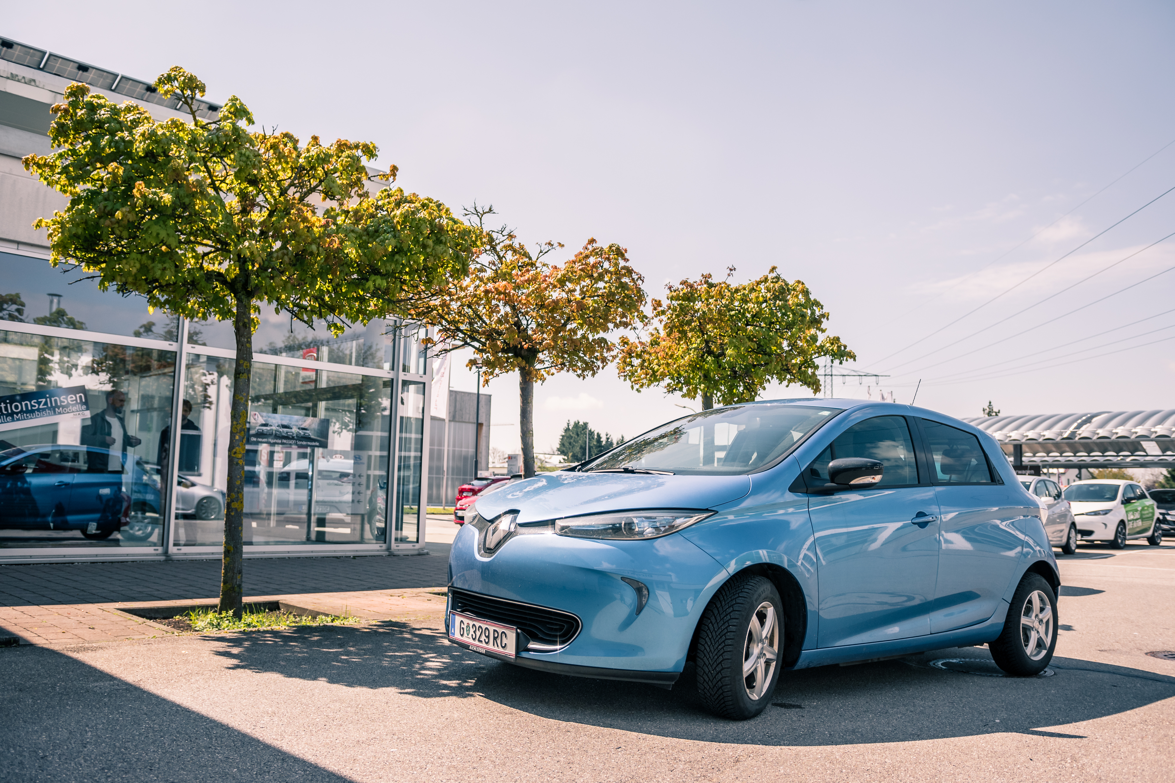 Stefan Ko hat seinen Hyundai IONIQ Electric in der Farbe Phoenix Orange beim Autohaus Sangl in Landsberg abgeholt.